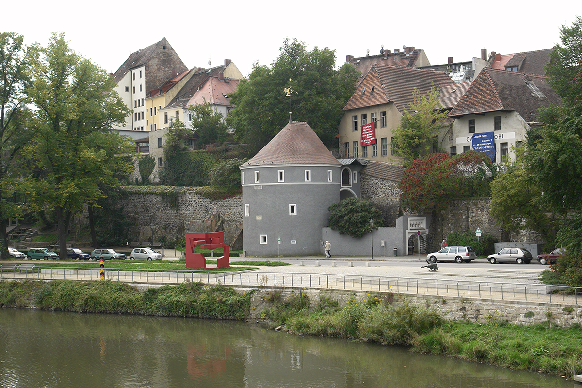 Görlitz, Ochsenbastei am Neiße-Ufer